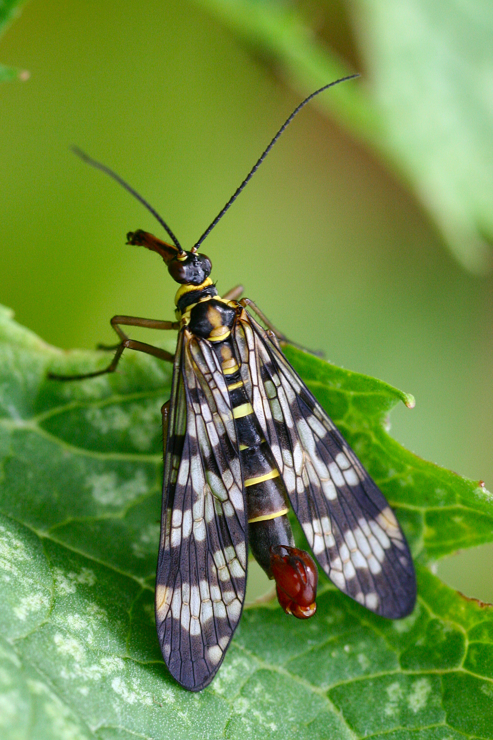 Beschreibung: Skorpionsfliege Panorpa vulgaris Quelle: selbst fotografiert Datum: August 2006 Fotograf: Karsten Dörre (grizurgbg)